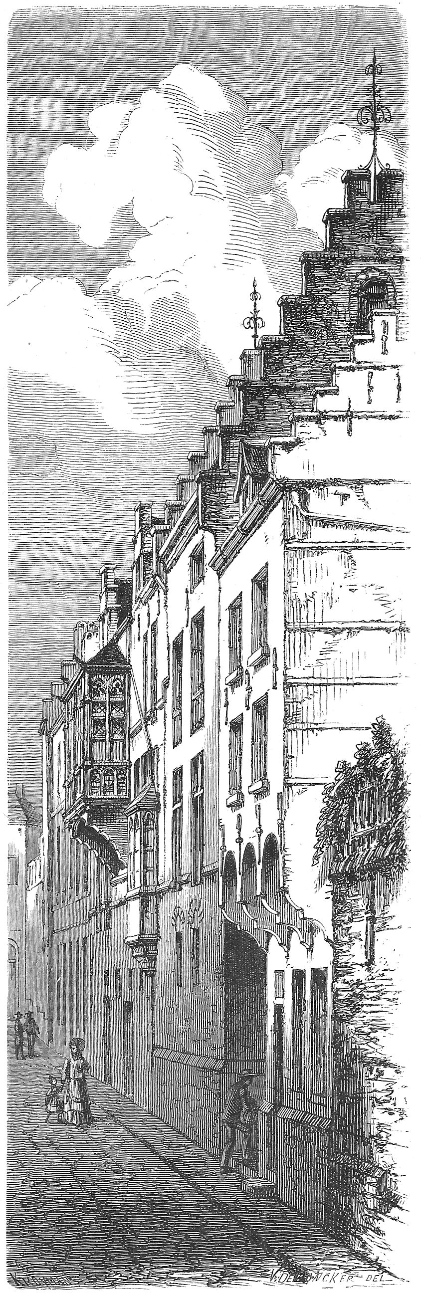 Bruxelles — Façade de l’hôtel de Ravestein en 1882.